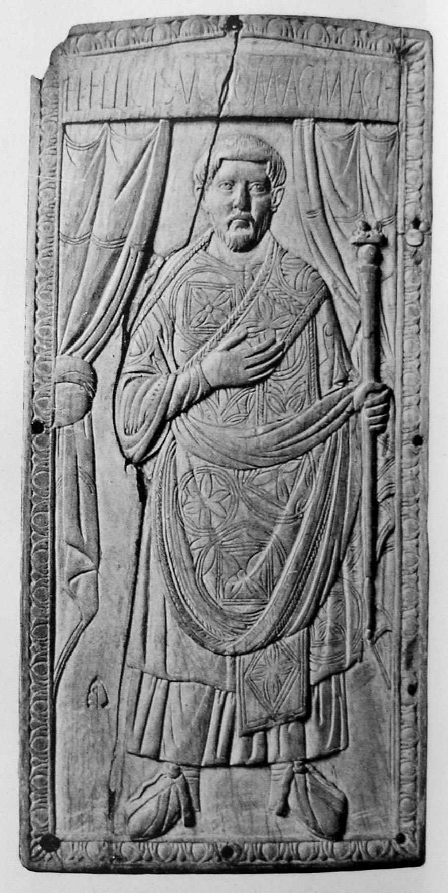 Feuillet du diptyque de Flavius Felix Flavius Felix, consul en 428, Rome, Ivoire d'éléphant, Ancien trésor de l'Abbaye Saint-Junien de Limoges